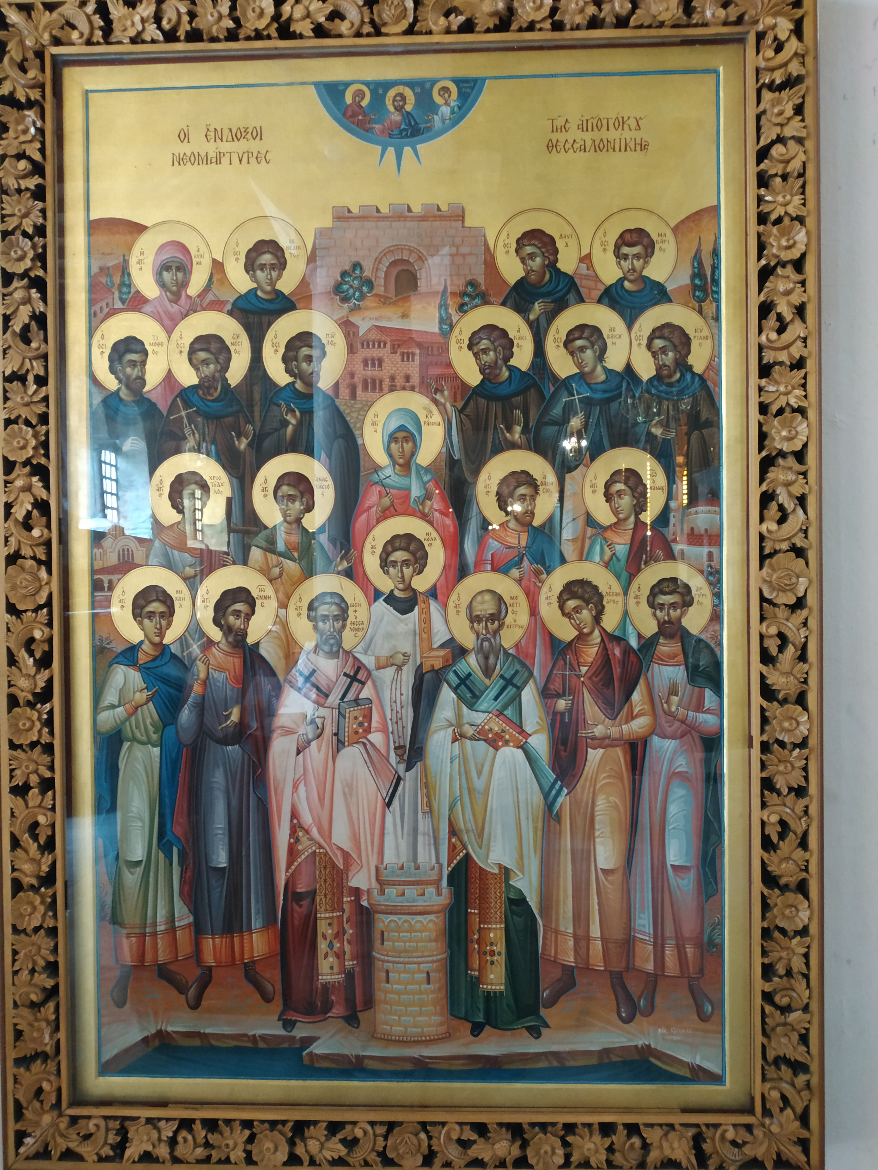 святі мученики. Ікона в Храмі Салонік, святого Димитрія Солунського